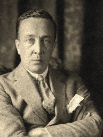 Антти Фавен, финский художник-портретист